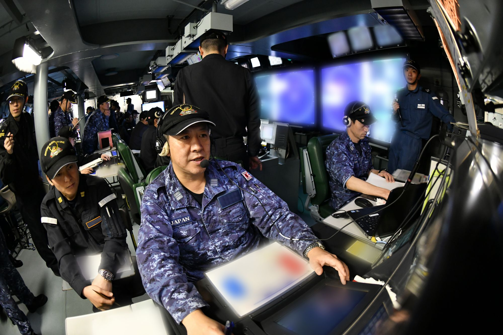 ＣＩＣ（Combat Information Center：戦闘指揮所）における訓練の様子です。ＣＩＣでは、各部からの情報を集約し、状況を把握しつつ、意思決定を行います。